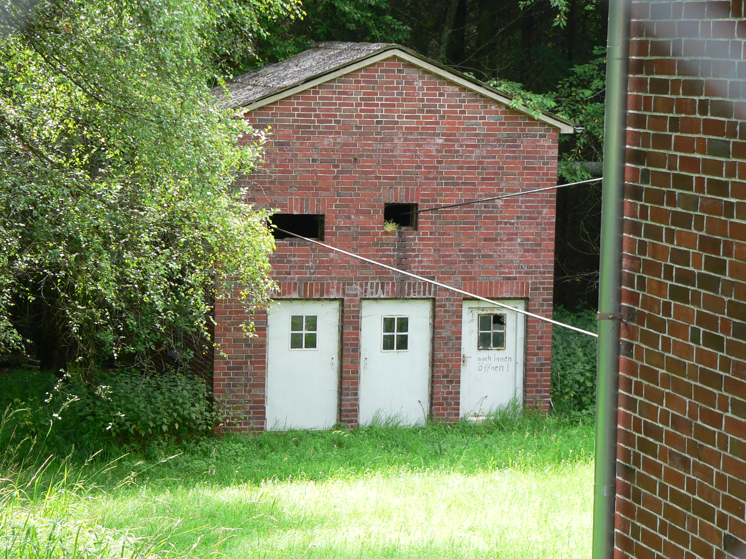 Seilscheibenhaus der Grube Fortuna bei Wetzlar, Deutschland